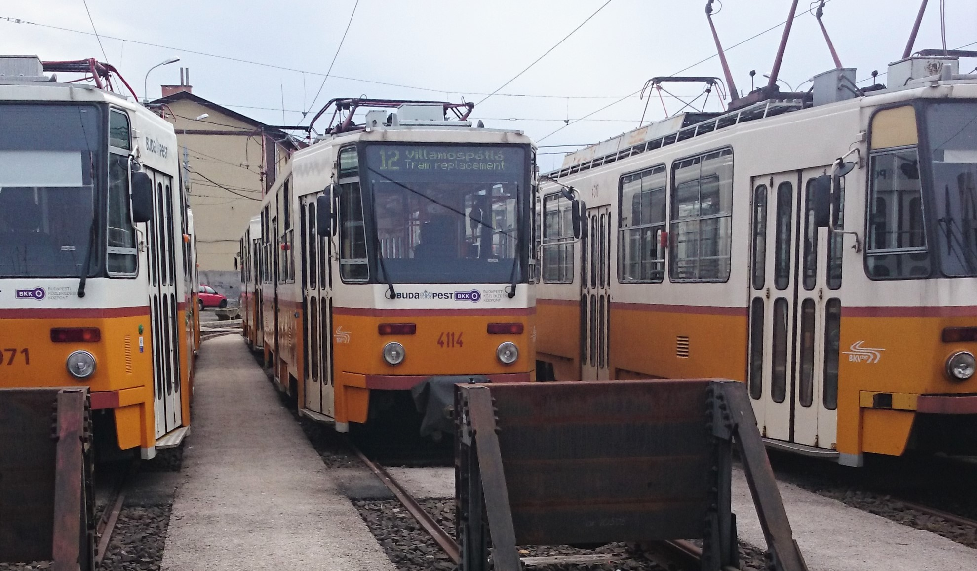 Tatra T5C5K az Angyalföldi kocsiszínben